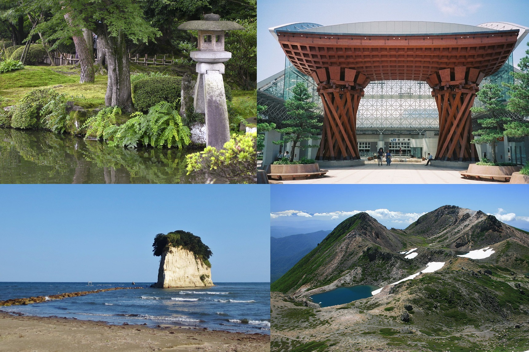 石川県・モンタージュ画像